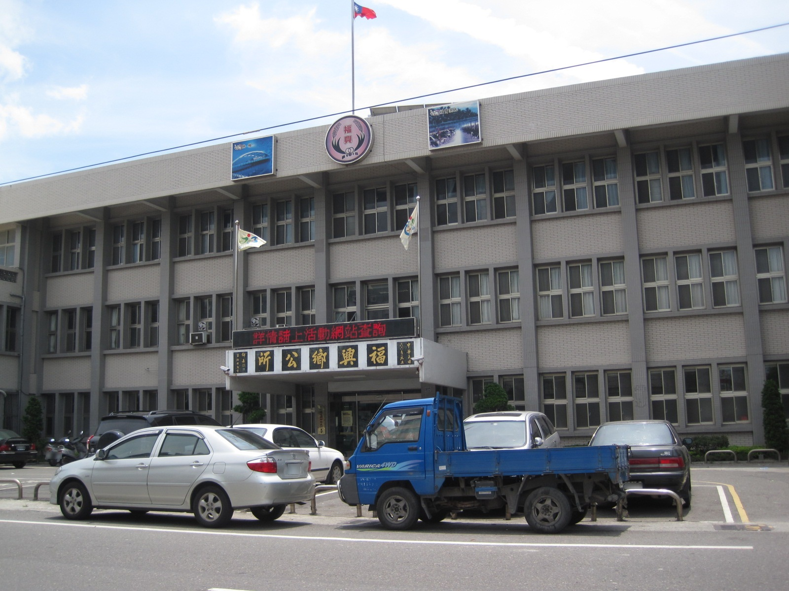 臺灣彰化縣福興鄉公所